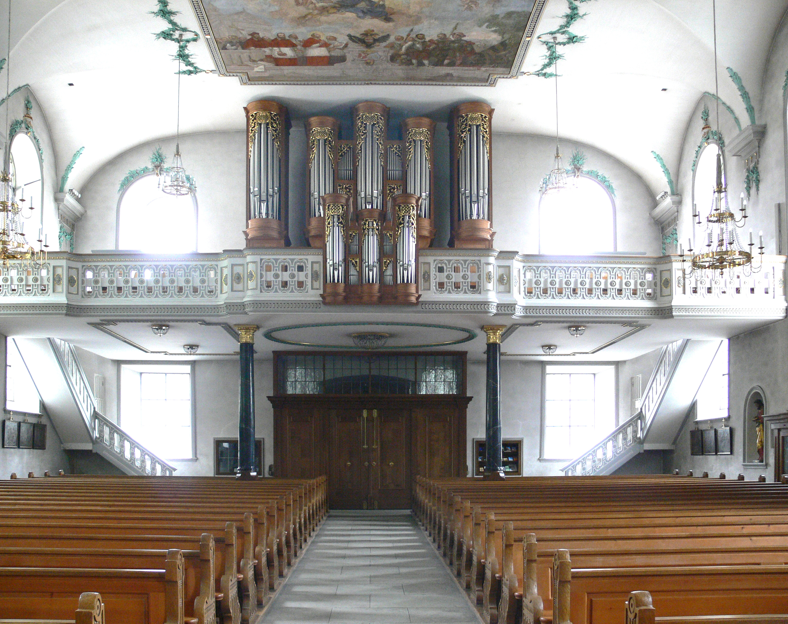 Hohenems, Vorarlberg: Pfarrkirche St. Karl Borromäus, Blick zur Gollini-Orgel